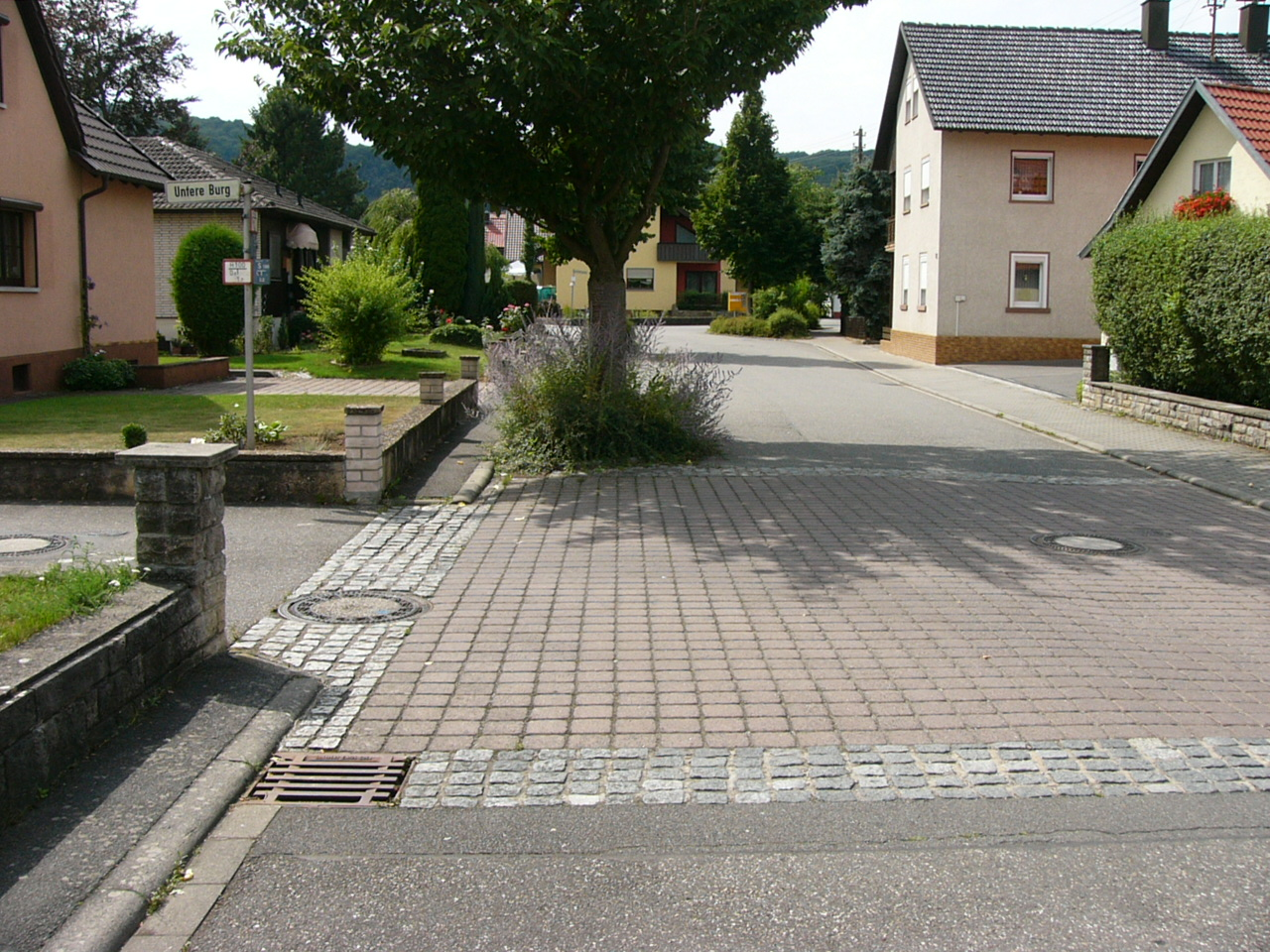 Standort der 1523 zerstörten Wasserburg in Unterbalbach: Heute deutet nur der Straßenname und der kanalisierte Fluss auf die Burg hin